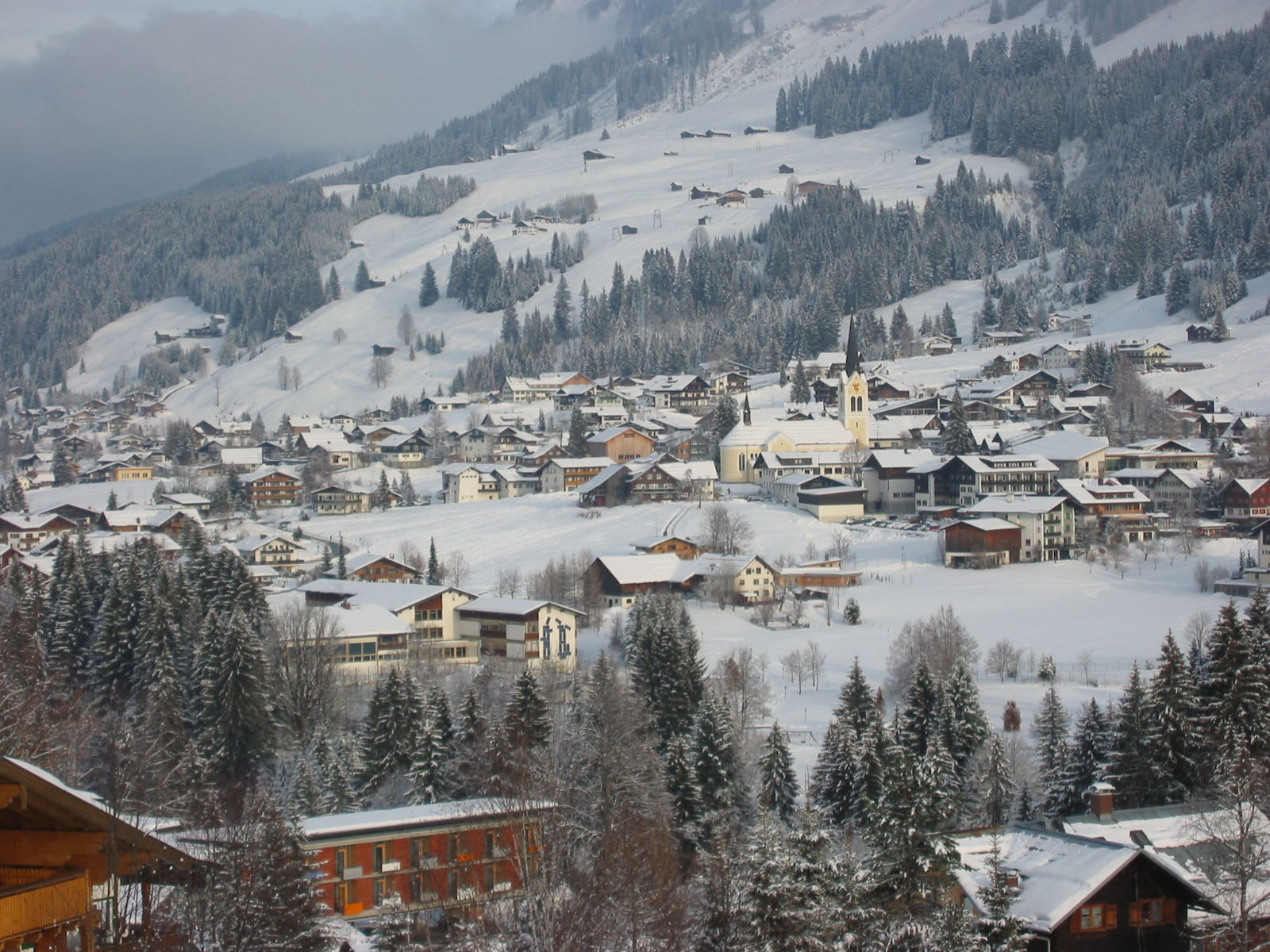 Das Zentrum von Riezlern im Kleinwalsertal. Aufgenommen vom Haus Bergkranz.